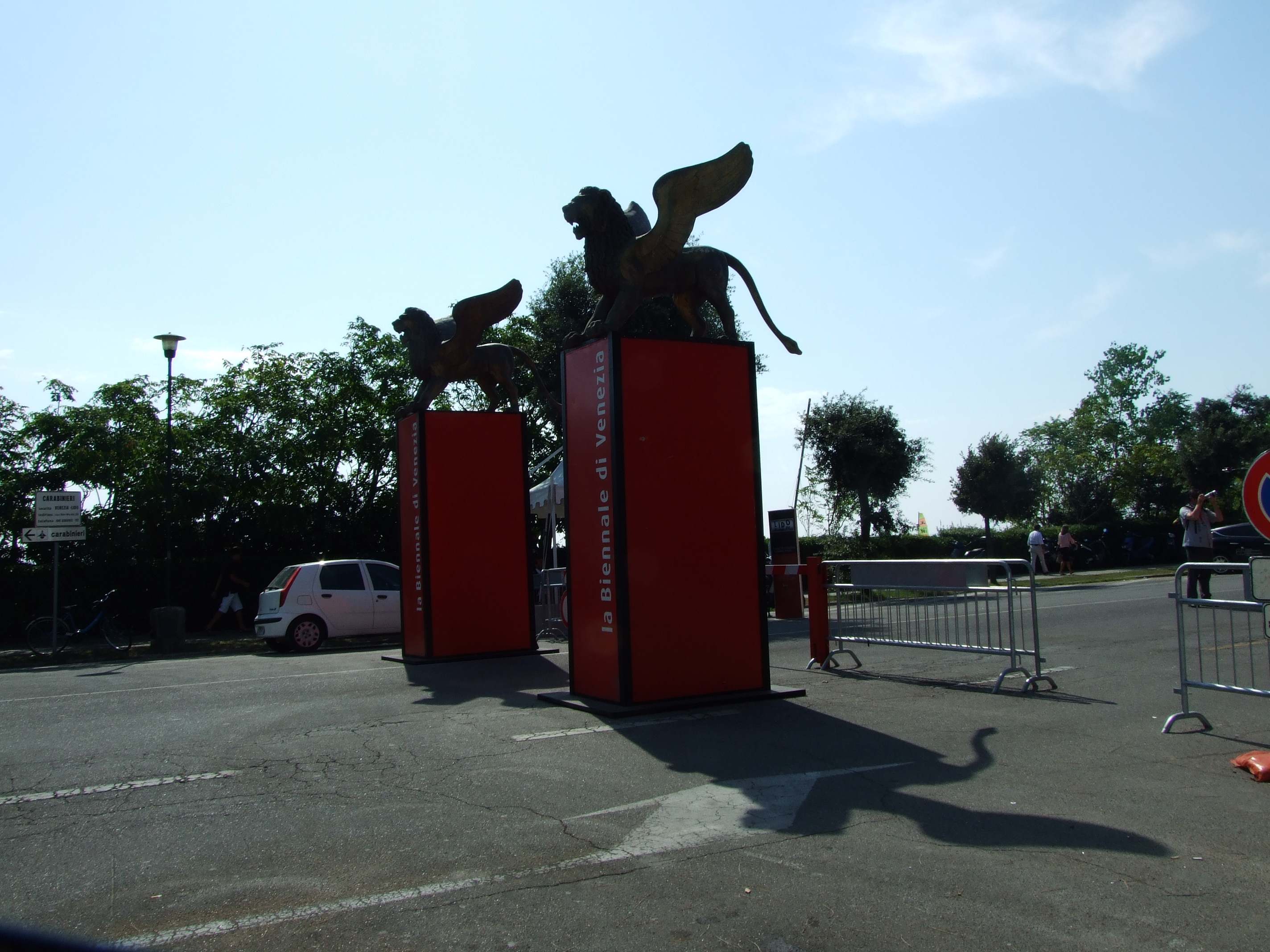 La Biennale di Venezia, 2008.